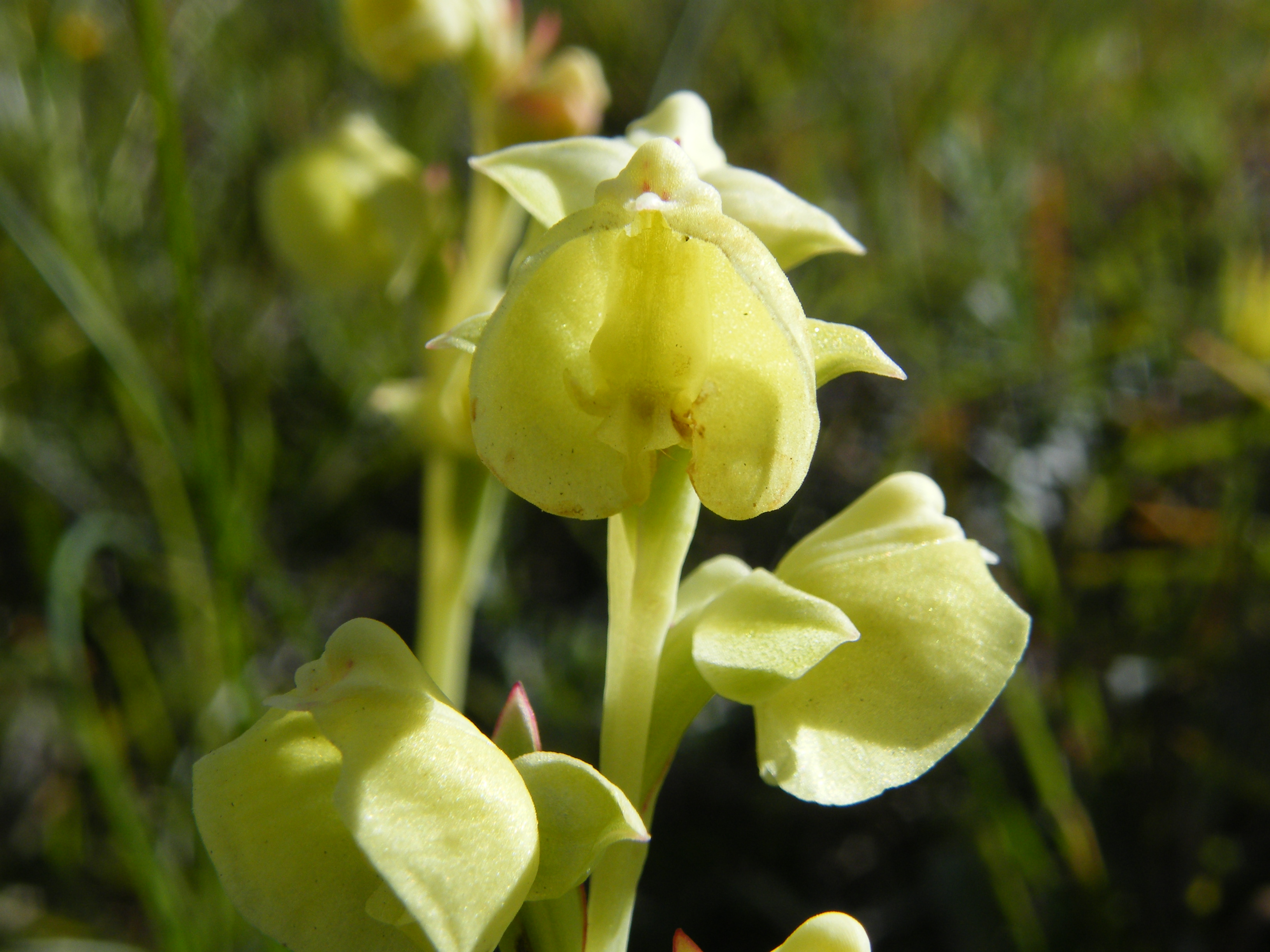 Moederkappie (Pterygodium catholicum)